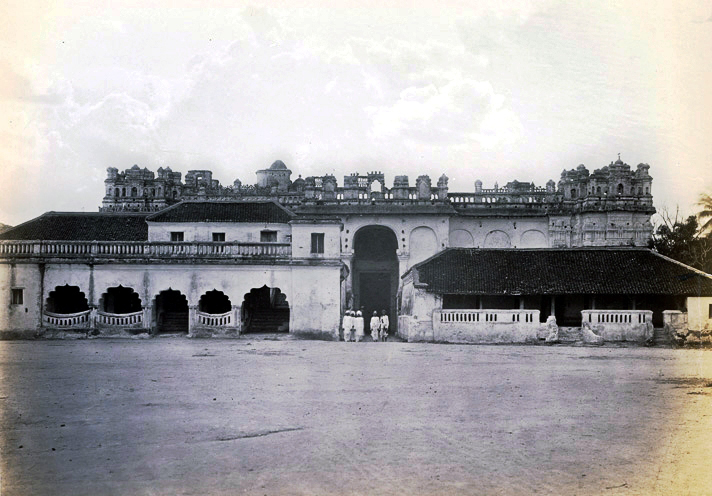 இராமநாதபுரம் அரண்மனை - 1784ஆம் ஆண்டு British Libraray online gallery said that This photogaraph was take by Lyon, Edmund David in the year of 1868 with the following notes: Ramanathapuram, the district headquarters and an ancient town, is worth visiting for its Ram Vilas Palace. This palace of the Sethupati Rajas of Tamil Nadu houses their oil portraits through the centuries. Ceilings and walls are decorated with early eighteenth century murals, depicting subjects such as business meetings with the English, and battles with the Maratha chief Sarabhoji, as well as scenes from epics. Lyon wrote of the Raja and this view: '[it] gives a front view of his Palace, which cannot be said to belong to a very high style of architecture. However nothing can exceed his kindness and civility, and the traveller availing himself of his bullocks, which he is sure to offer, Nina Covill may be reached the first night, a distance of twenty-three miles. It is said there was here a temple dedicated to snake-worship, but nothing of the sort is to be found. From hence, in another night, Calliar Covill can be reached, the distance being twenty-seven miles. There is excellent camping-ground, under trees, close to the pagoda, which, according to Hindu history, was created 17,000 years ago, by the Emperor Chakravartee'.